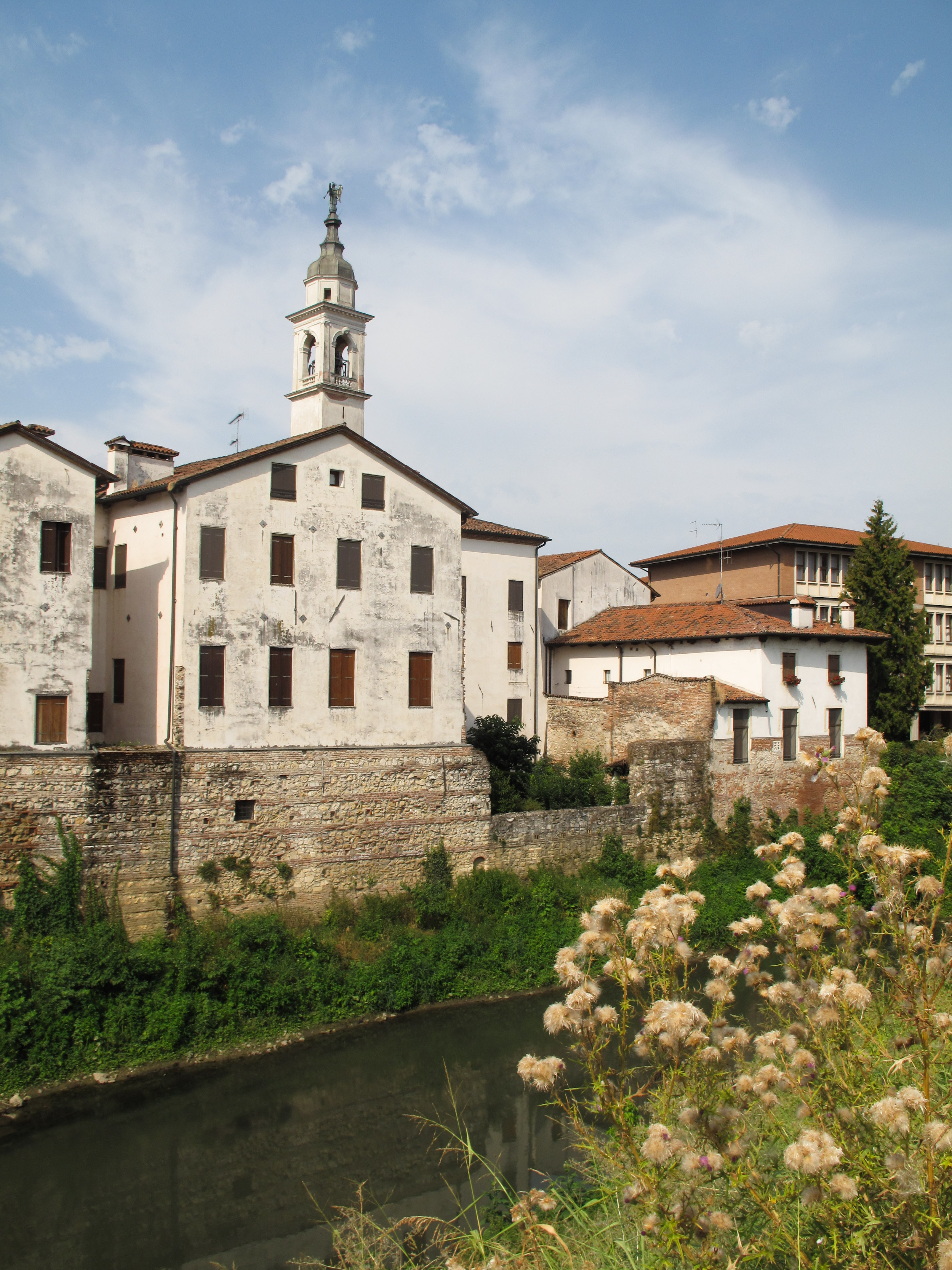 Vicenza - Mura veneziane in Borgo Berga